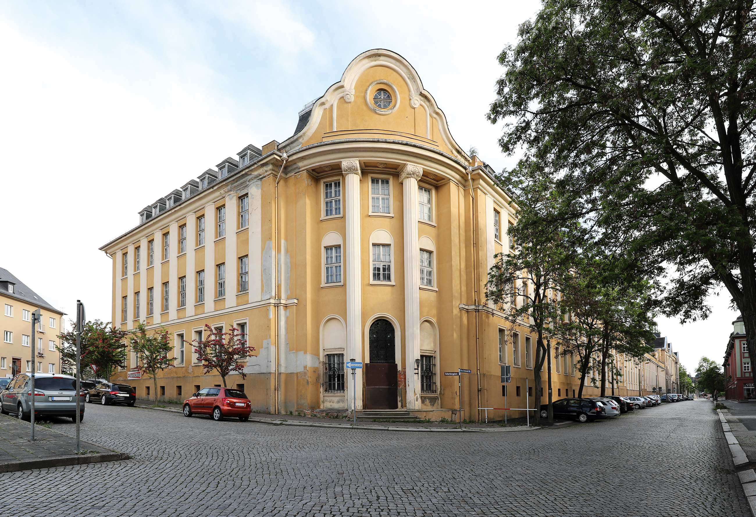 Verwaltungsgebäude Boeßneck & Meyer erbaut 1927 von Architekt Adolf Krebs.